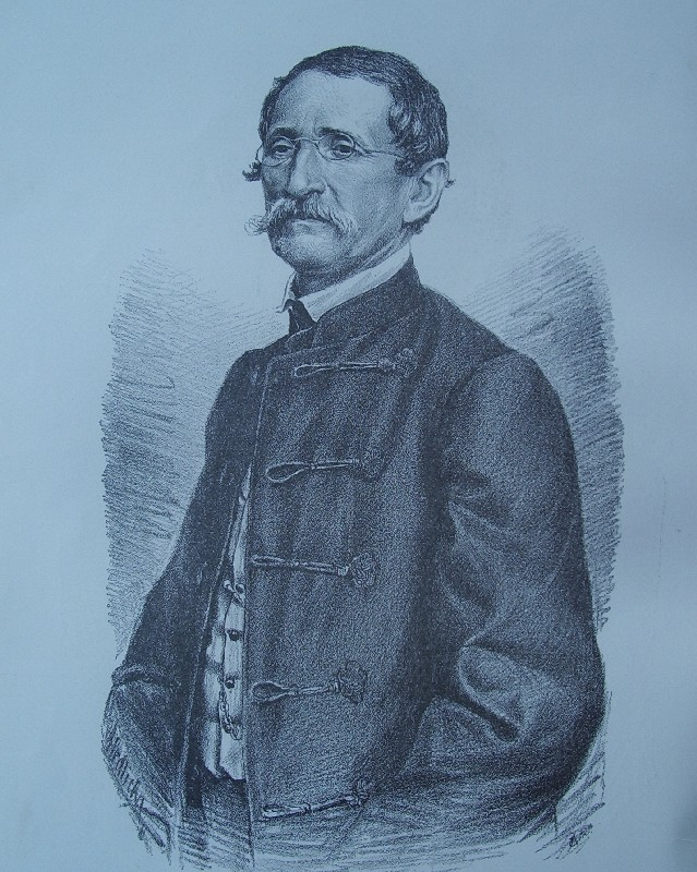 Ferdo Rusan (1810-1879), croatian composer od popular songs